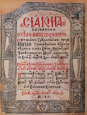 Кирилл Транквиллион-Ставровецкий. Перло многоценное. Чернигов. 1646. Титульный лист.